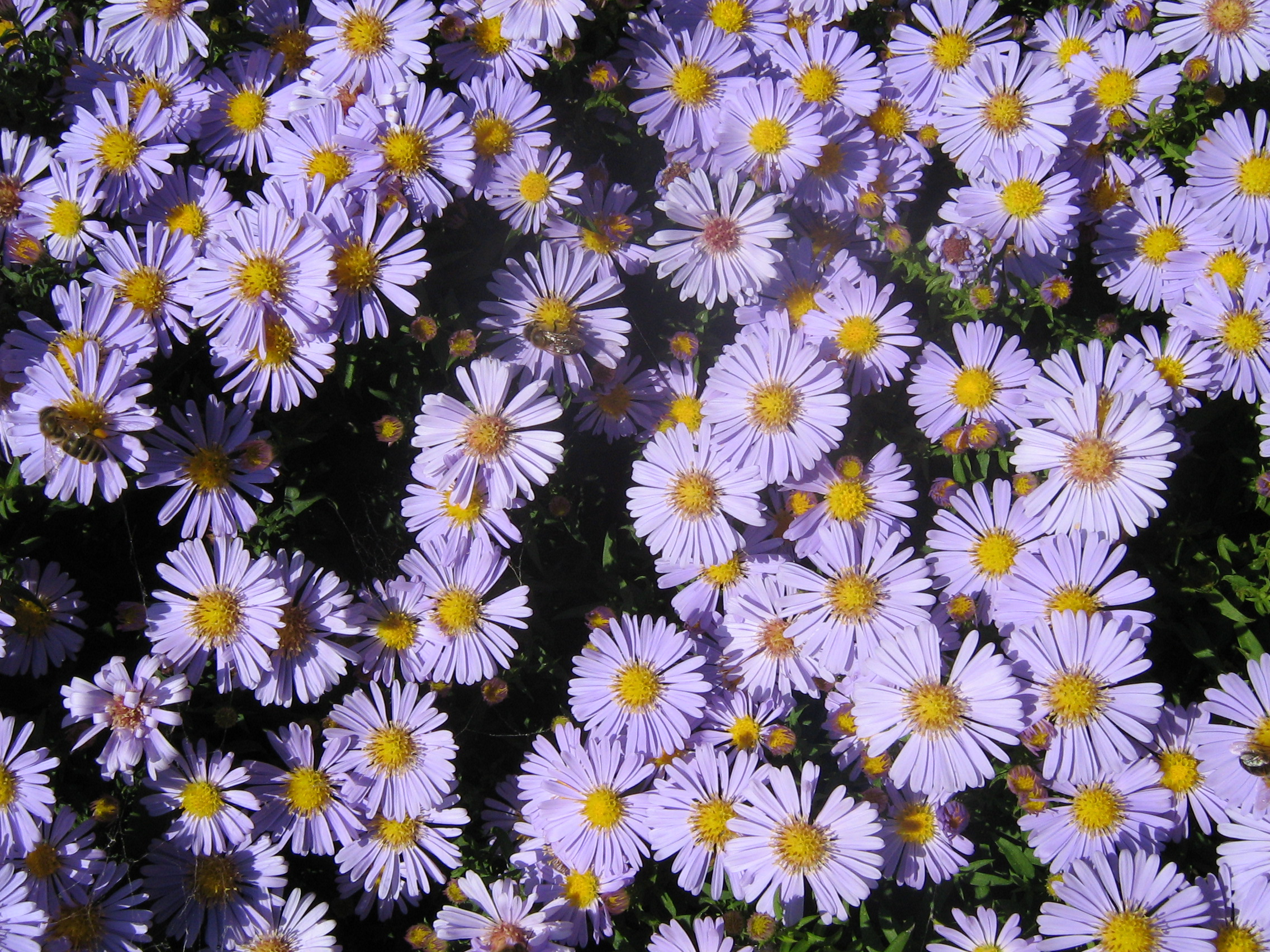 Zdjęcie przedstawia kwiaty Astra Gawędki który jest pod ochroną.